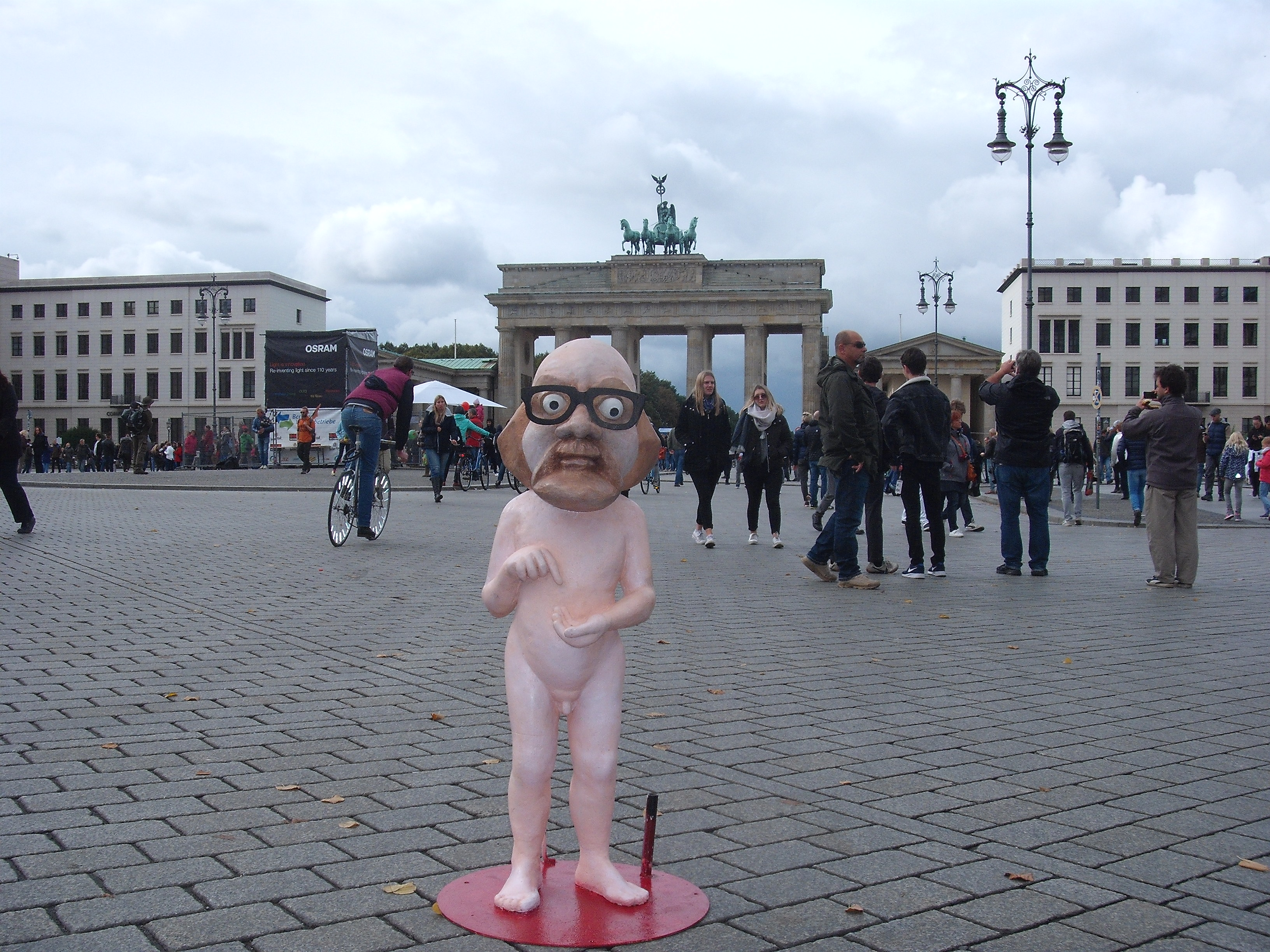 Włapko w Berlinie w Niemczech